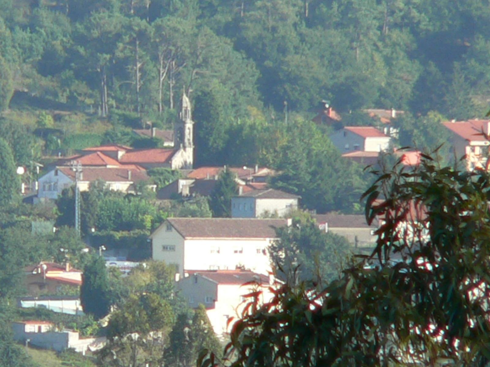 igrexa de Calo dende O Picón